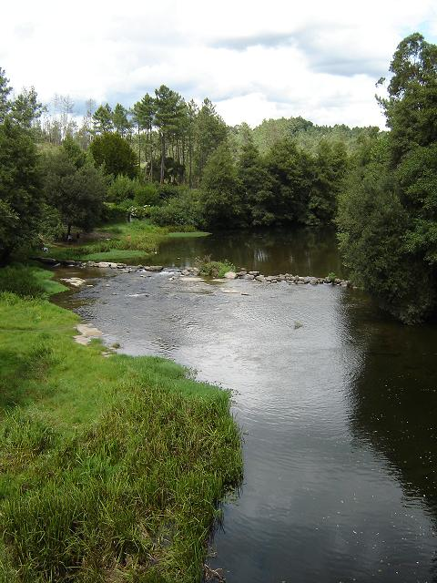 Ponte nova praia